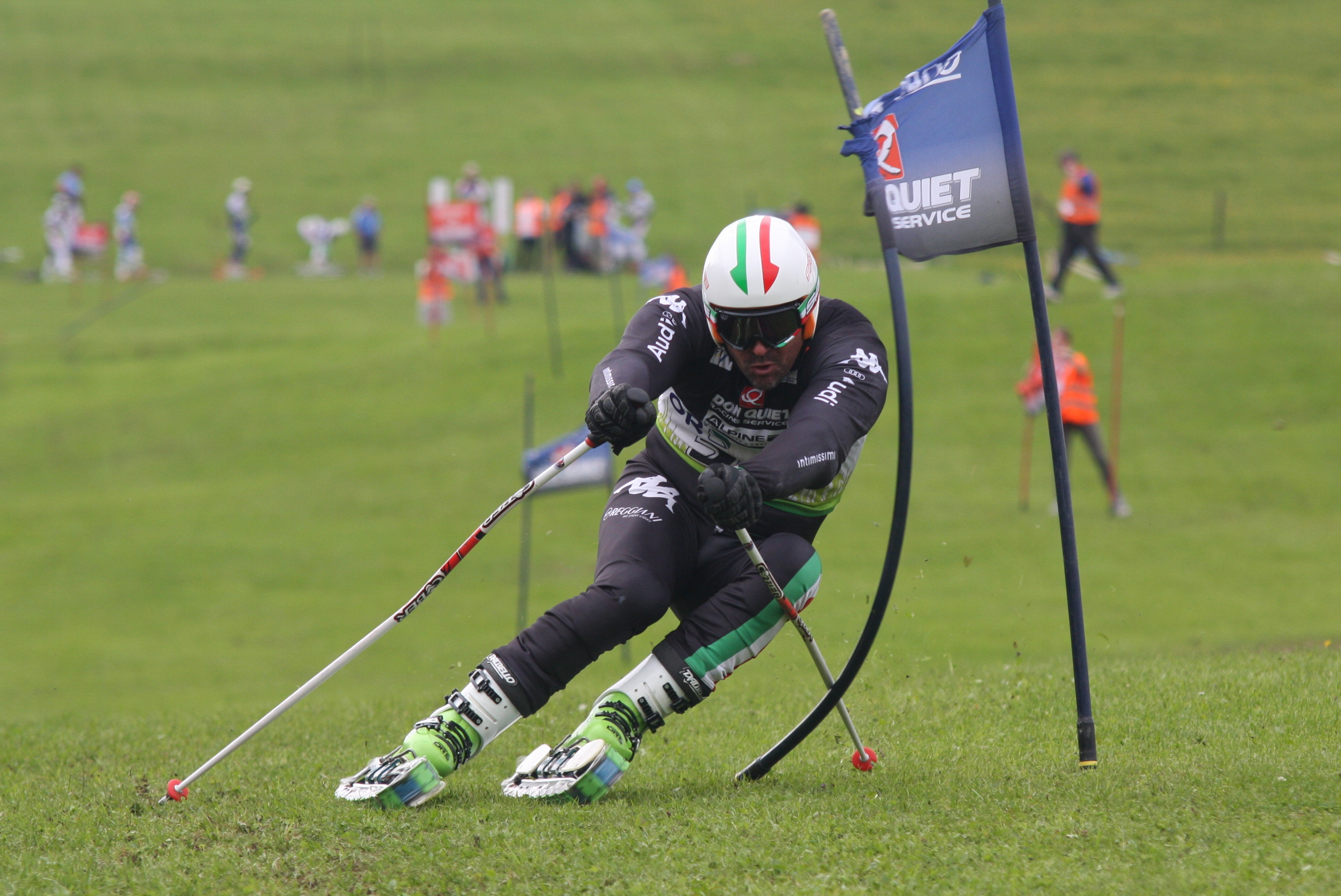 Stitna (CZ) 2014